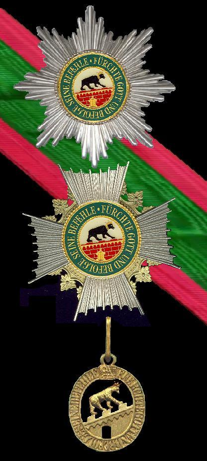 EEn scan van twee sterren en een juweel uit mijn verzameling. Het lint is getekend. Robert Prummel 25 jun 2006 02:29 (CEST)